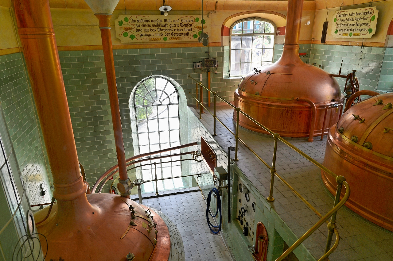 Blick ins Sudhaus der Irseer Klosterbräu